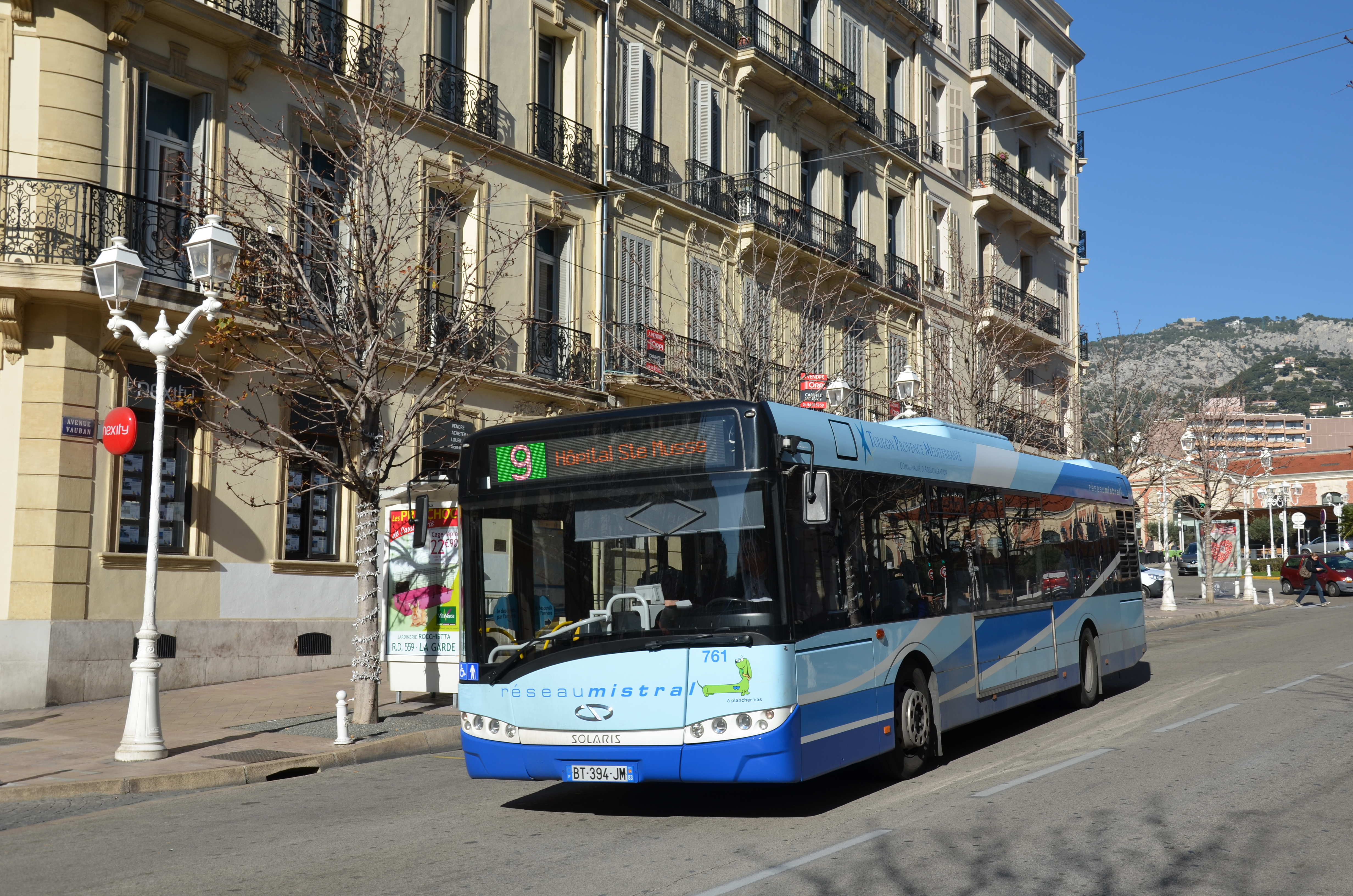 Solaris Urbino 12 Hybride n°761 sur la ligne 9 du réseau Mistral, près de l'arrêt Gare à Toulon.